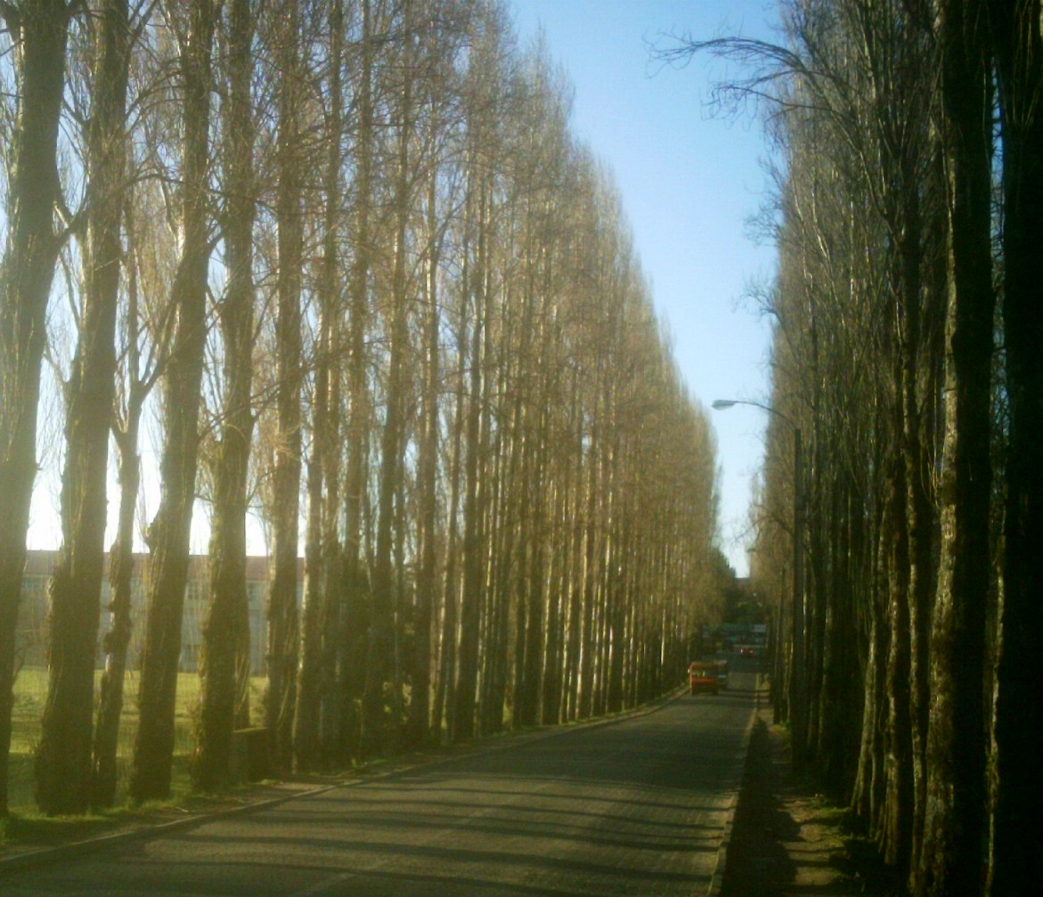 Alameda de entrada al Campus Teja de la Universidad Austral de Chile, Isla Teja, Valdivia